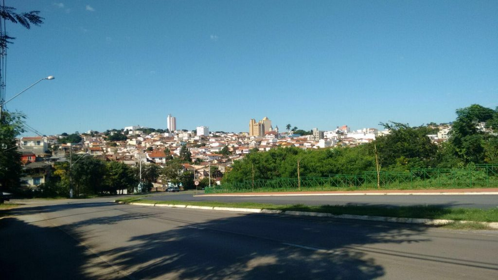 Entrada Da Cidade que Chega Pela Rodovia Francisco Alves Negrão sentido Itapetininga